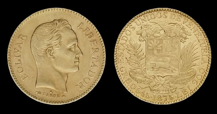 5 Venezolanos 1875